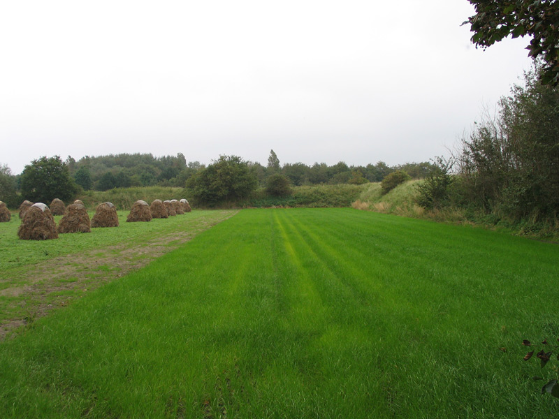 Schurvelingen (zandwallen) in het landschap bij Ouddorp op Goeree (provincie Zuid-Holland, Nederland)